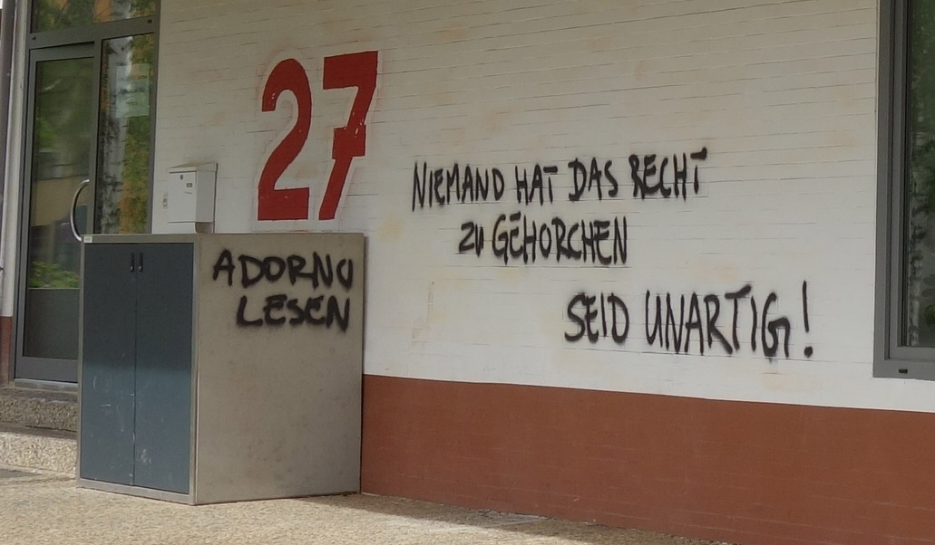 Graffiti in Göttingen von 2018: "Adorno lesen", "Niemand hat das Recht zu gehorchen" von Hannah Arendt und "Seid unartig!".